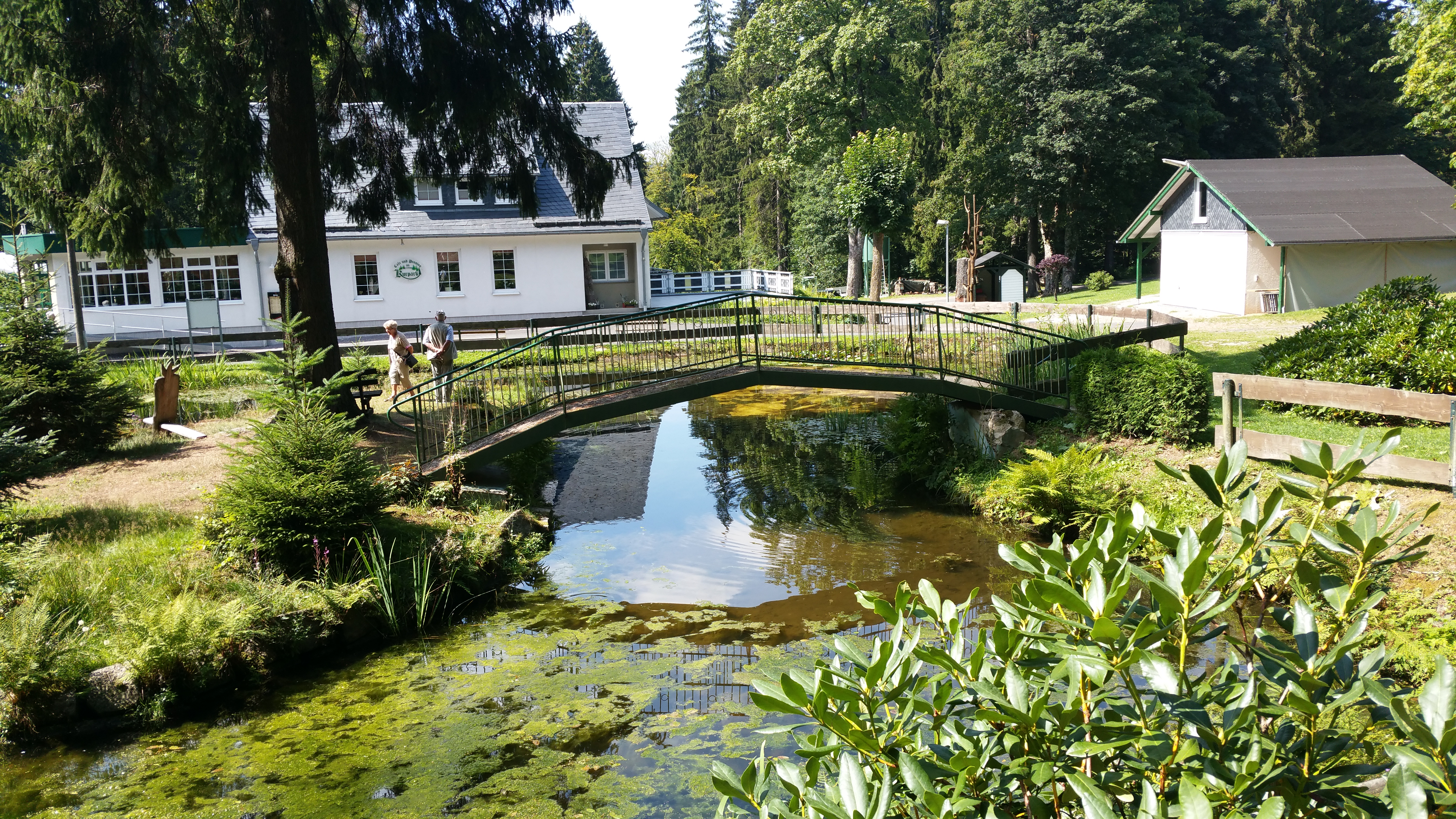 Kurpark